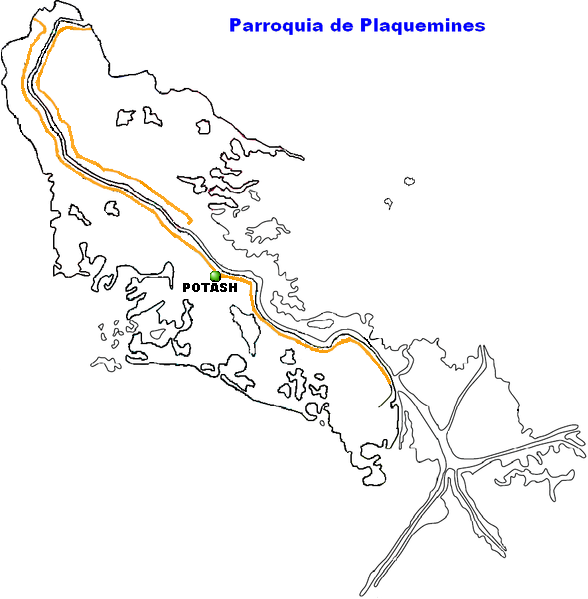 Potash, Louisiana.